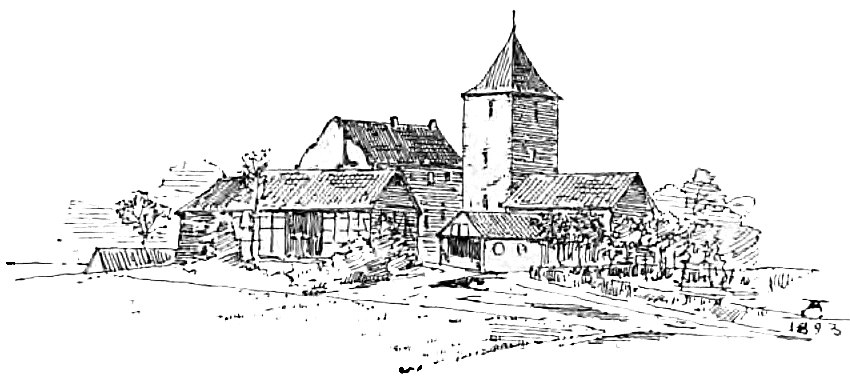 Burg Reuschenberg bei Elsdorf im Rheinland